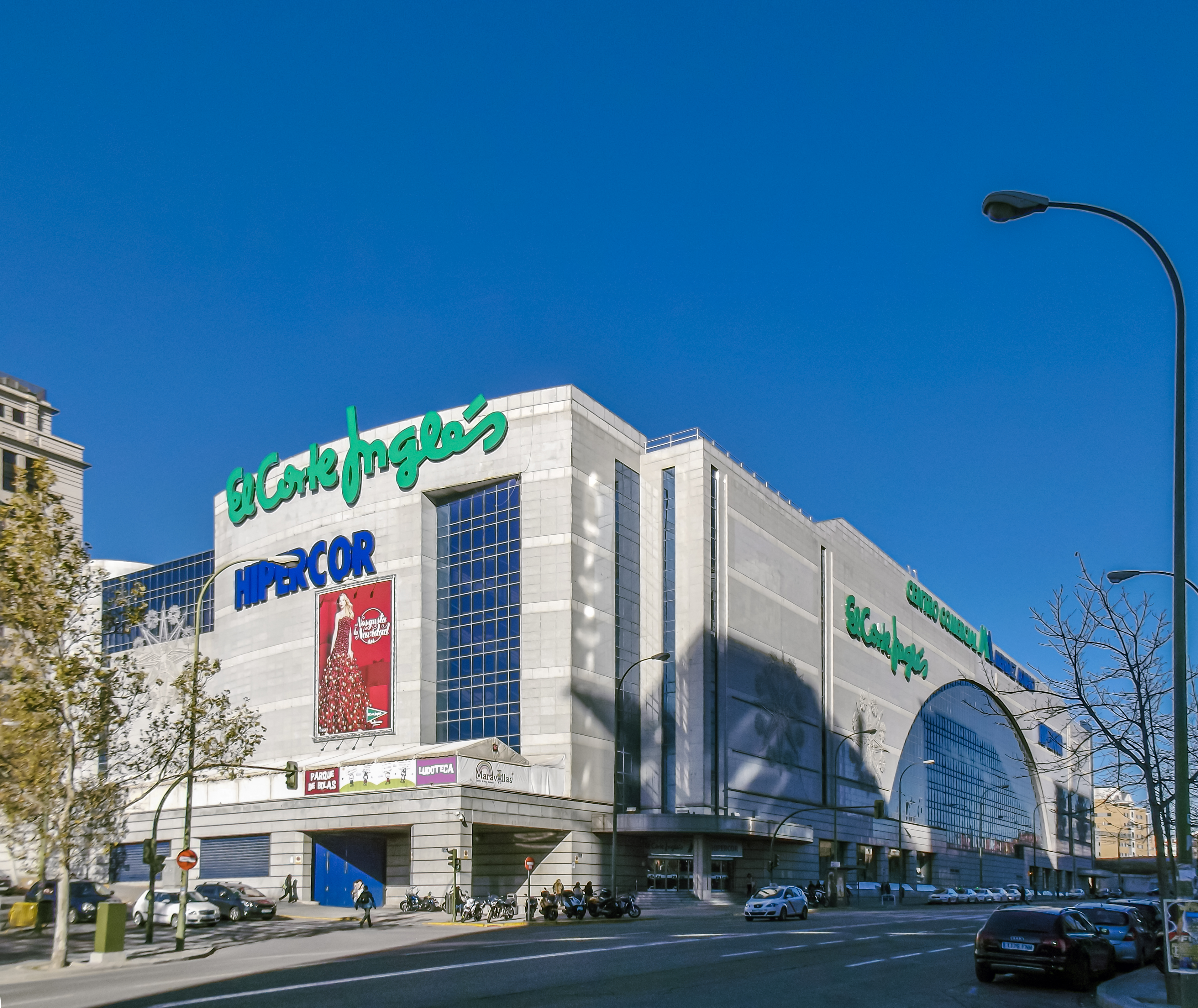 Vista del Corte Inglés de Méndez Álvaro desde la calle Retama, Madrid